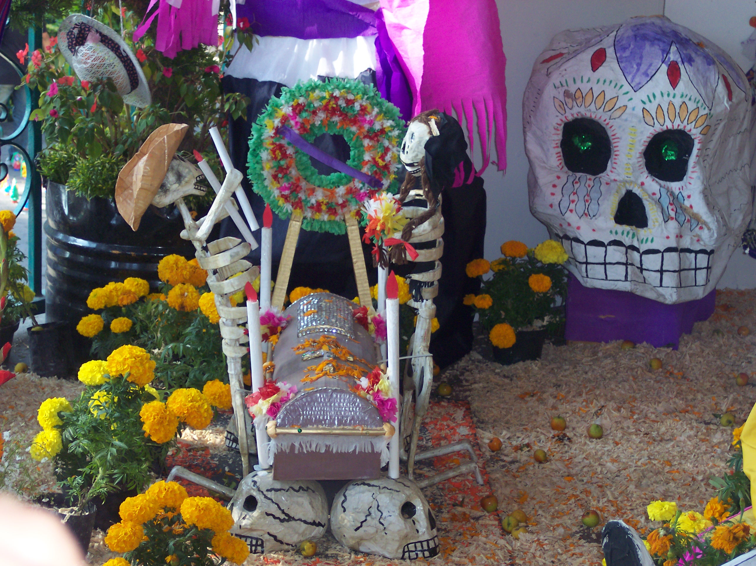 Detalle de la ofrenda hecha por empleados de la Delegación Xochimilco, D.F. México. Photo taken in Xochimilco, D. F. Mexico. November the 2nd, Day of Deads, a tradicional celebration in Mexico. SPANISH: Fotos tomadas en Xochimilco con motivo del día de muertos (2 de Noviembre) año 2006.